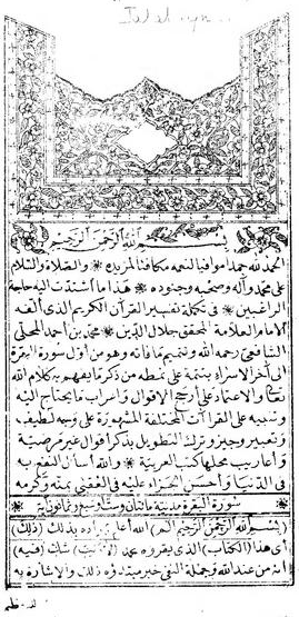 الصفحة الأولى من تفسير الجلالين - طبع القاهرة ١٢٧٨ هـ